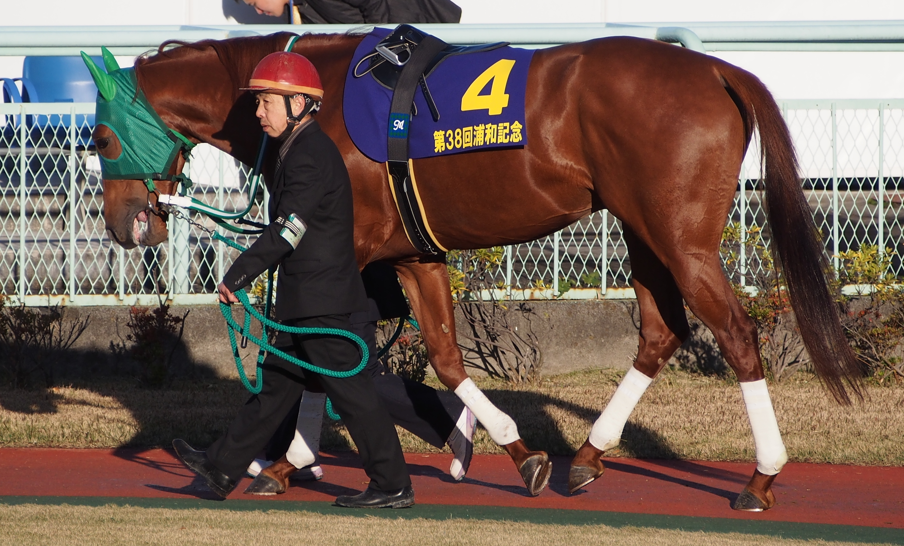 Higashi will win (ヒガシウイルウイン) Urawa Kinen paddock